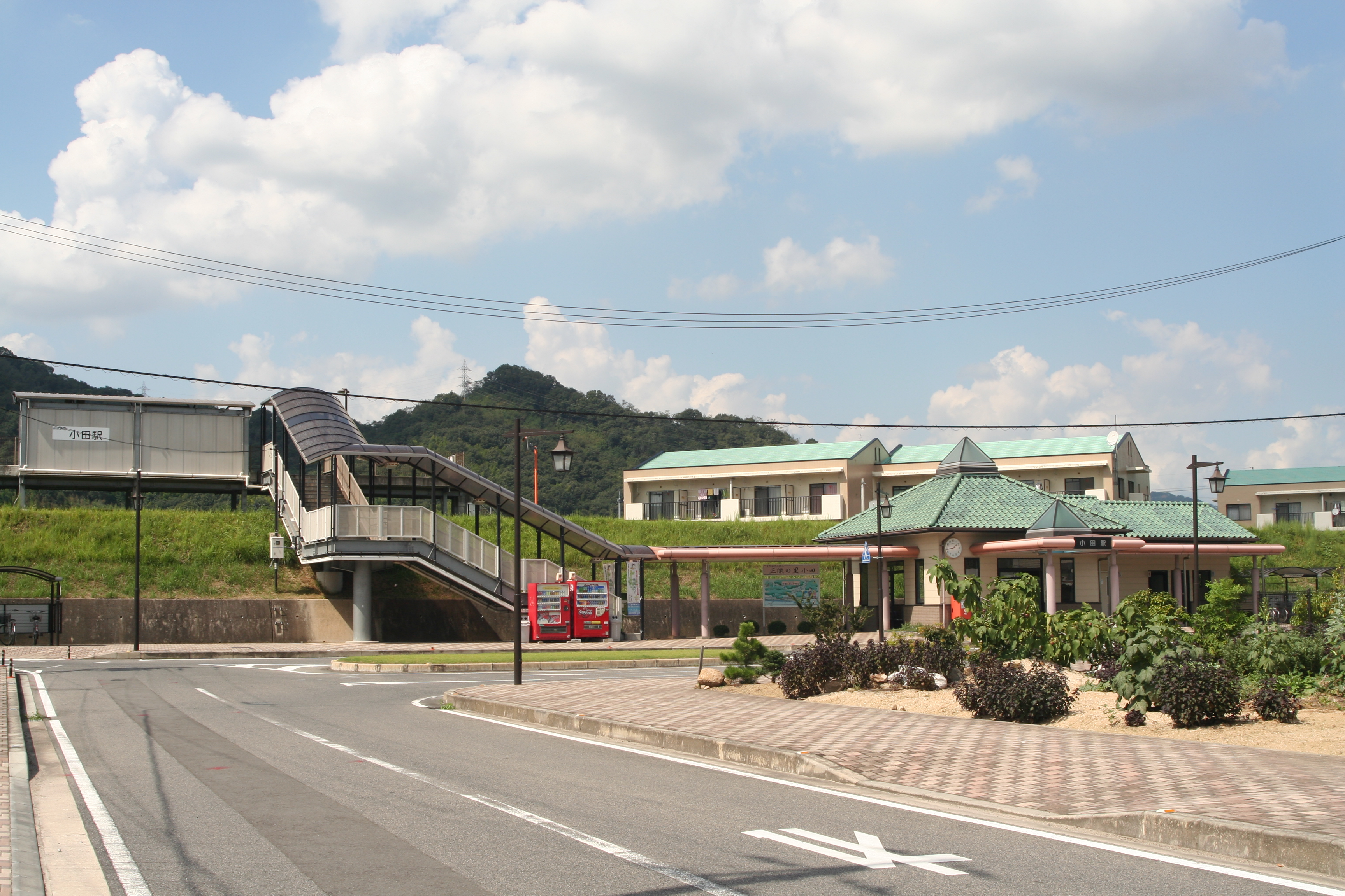 小田駅の全景